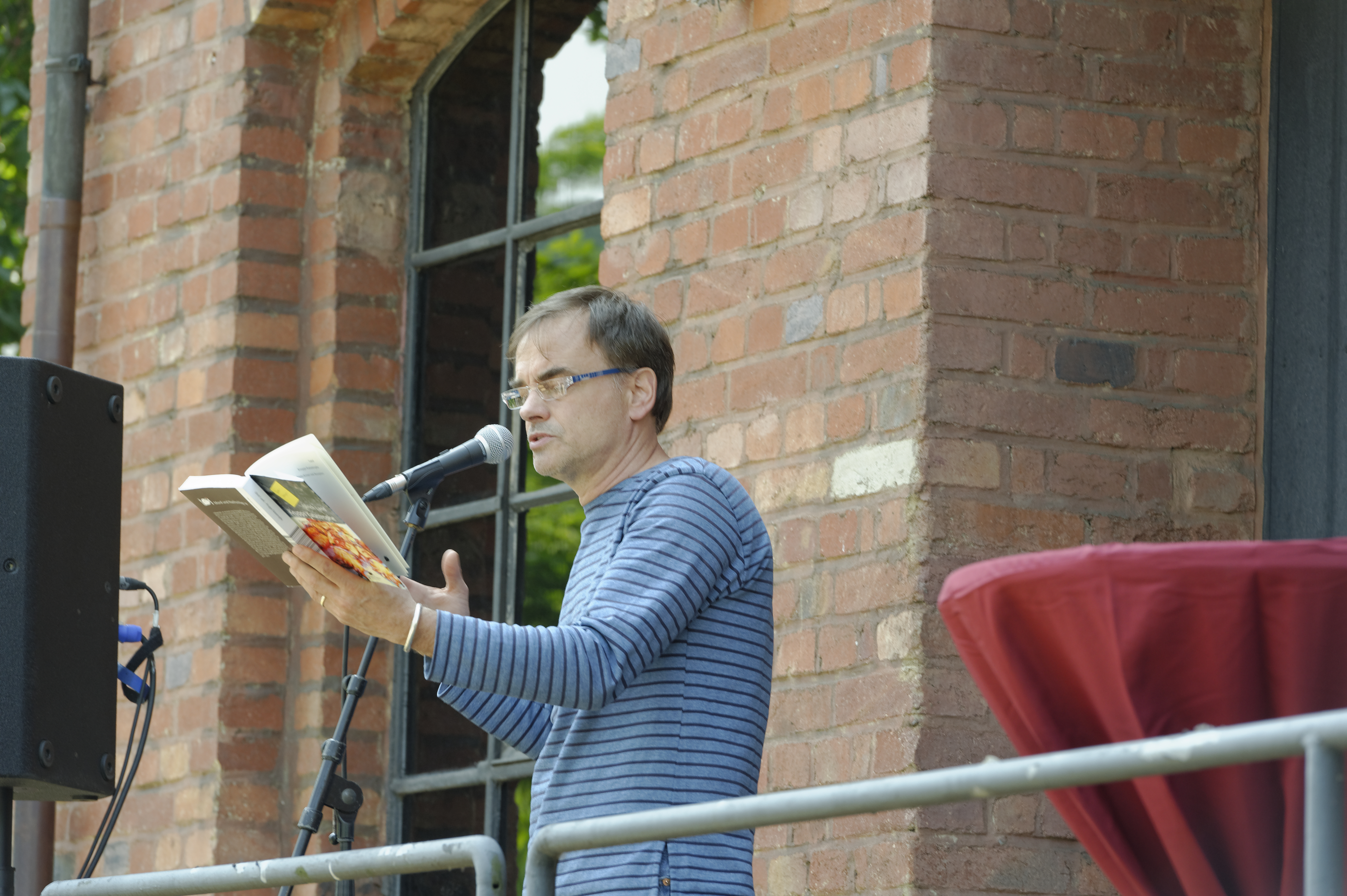 Engelsfest Wuppertal 2013 Ulrich Land